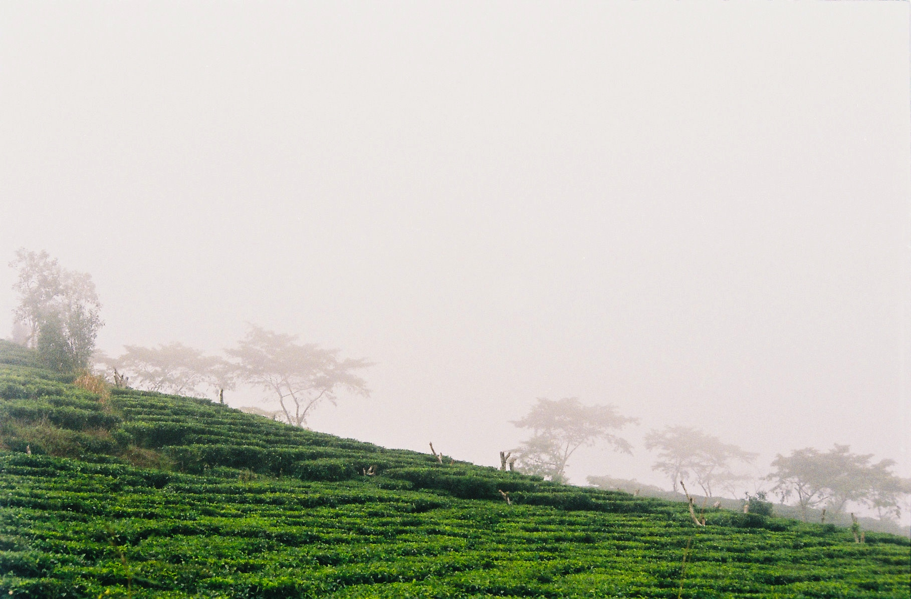 Đồi chè Cầu Đất, ngoại ô Đà Lạt